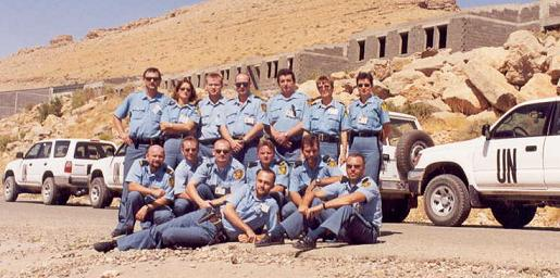 Příslušníci jednoho z českých kontingentů v UNGCI.